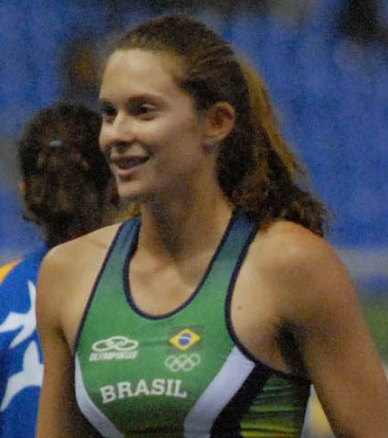 Rio de Janeiro - A paulista Fabiana Murer conquistou a medalha de ouro no salto com vara, ao elevar em 20 centrímetros o antigo recorde pan-americano de 4,40 metros